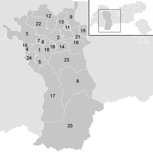 Leere Karte mit den Gemeinden im Österreichischen Bezirk Imst